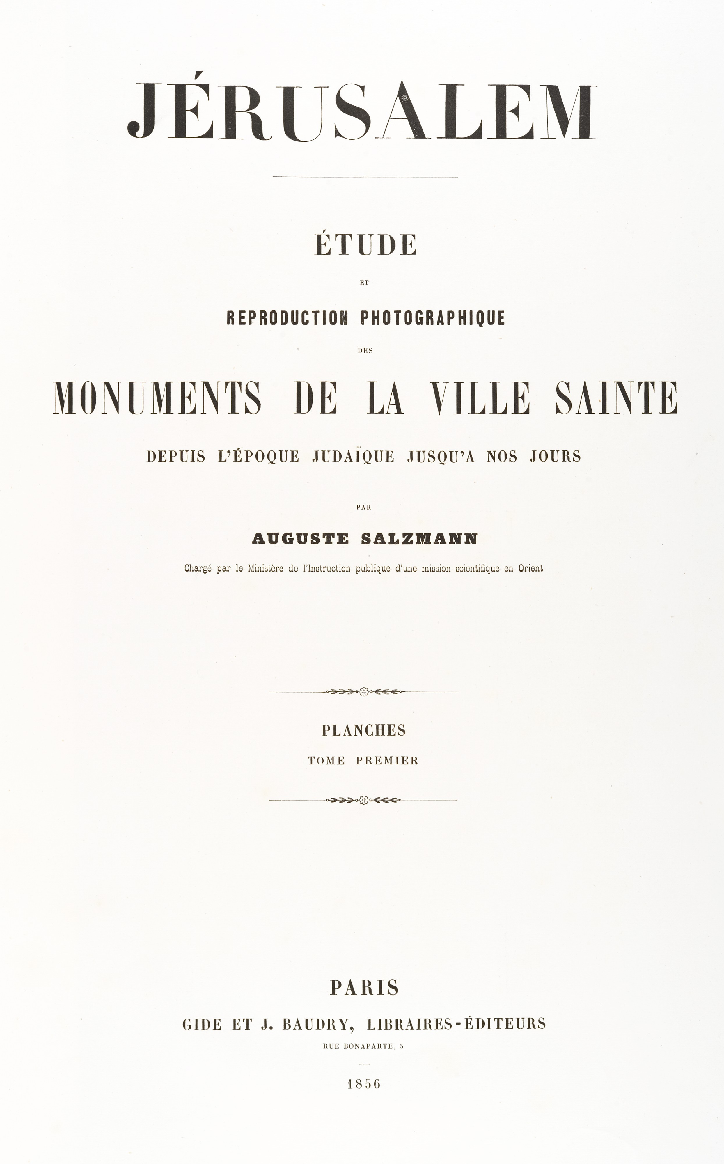 Portfolio; Portfolios